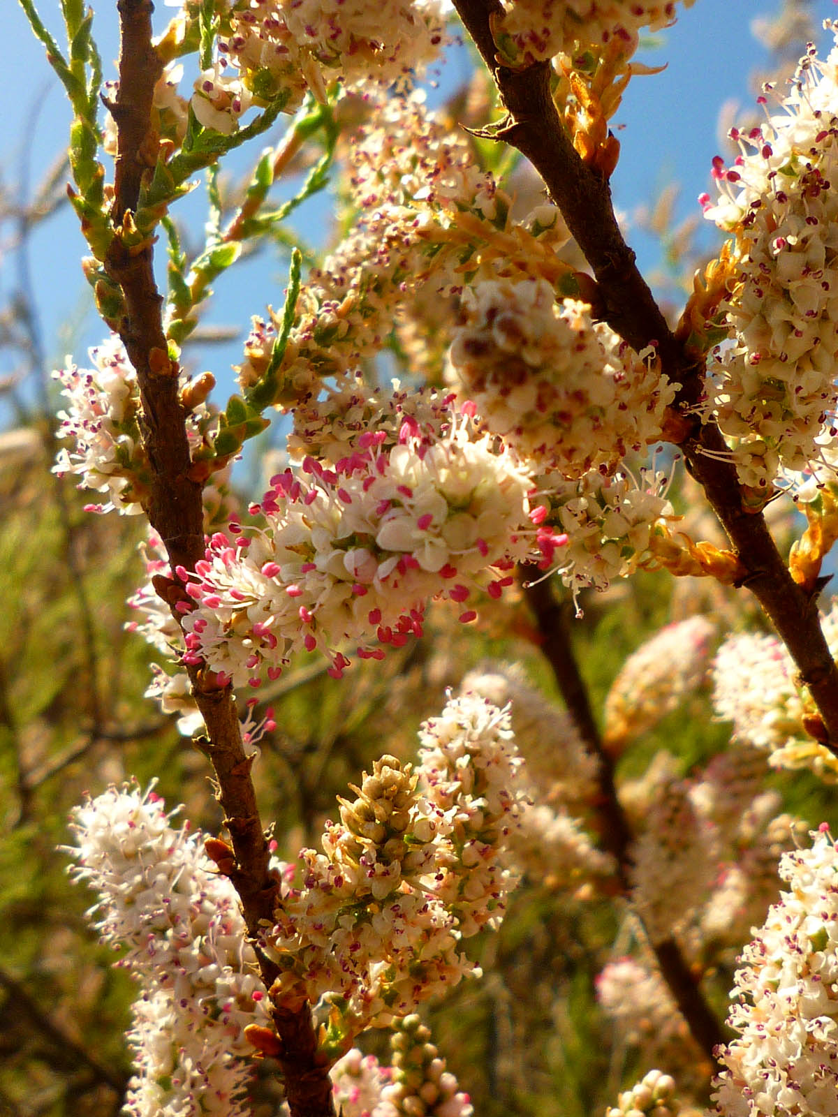 Taray (Tamarix boveana) en Portmán, España.